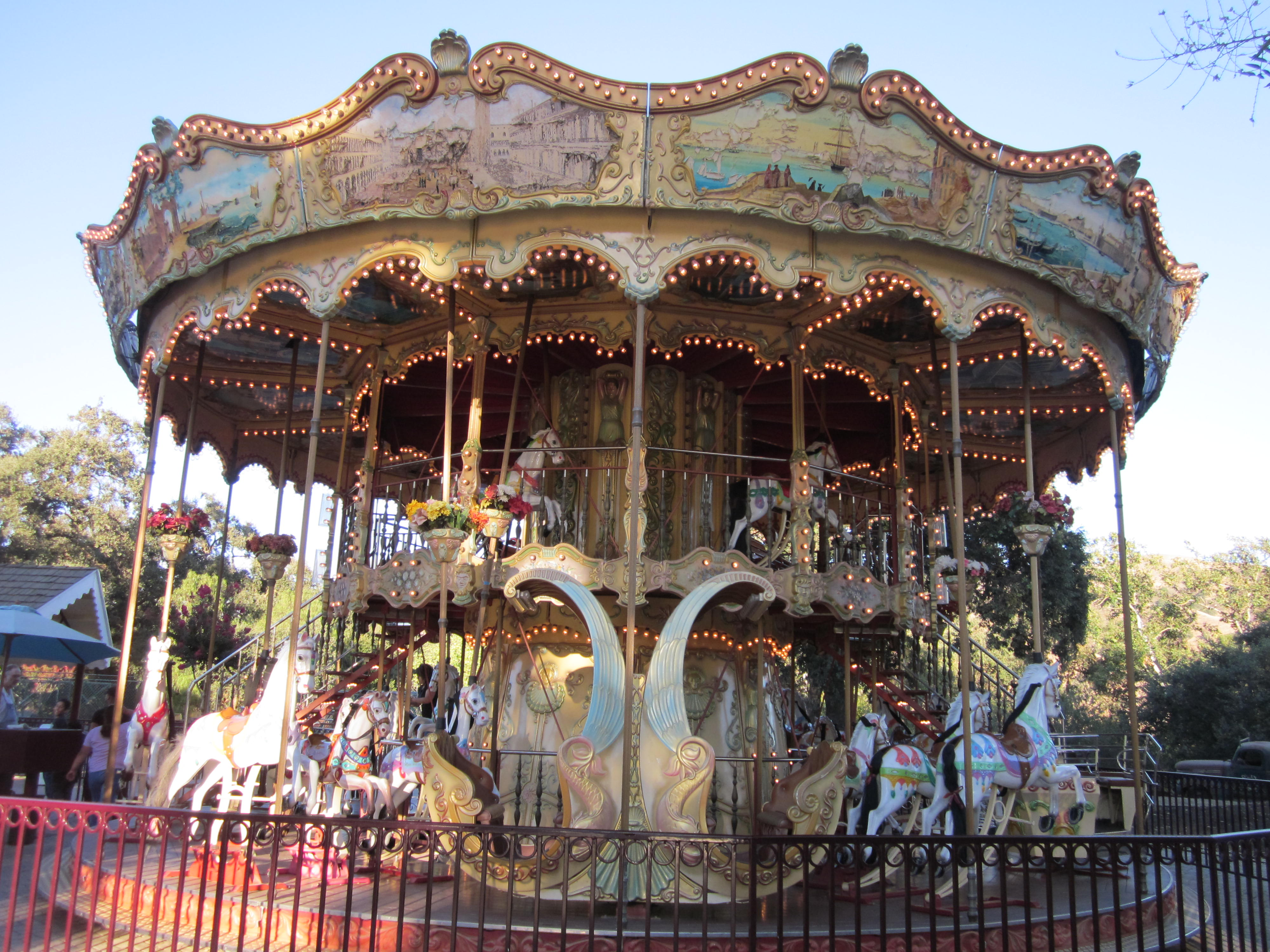 Casa de Carousel at Casa de Fruta in Santa Clara County, California.